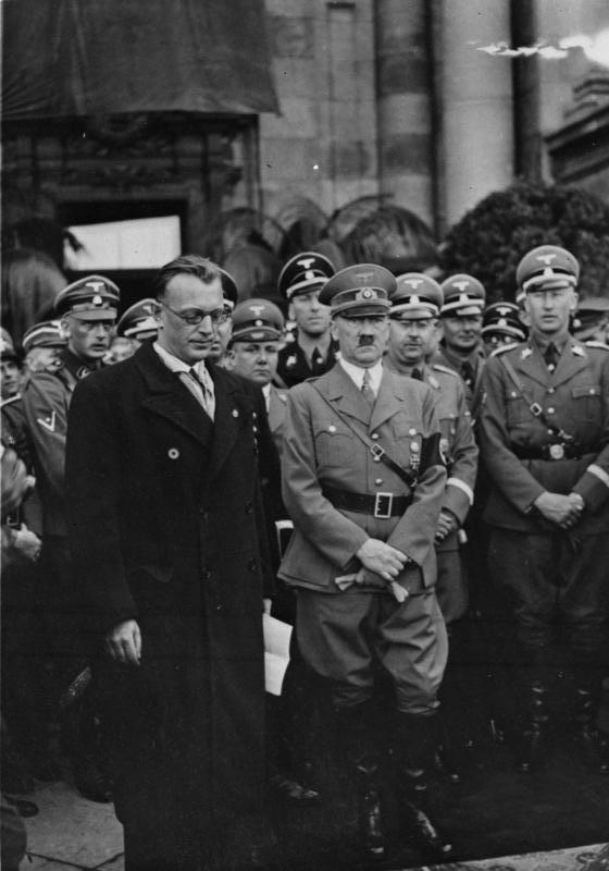 Wien, Arthur Seyß-Inquart, Adolf Hitler Hitler in Wien mit Arthur Seyß-Inquart [Österreich, Wien.- Adolf Hitler mit Reichsstatthalter von Österreich Dr. Arthur Seyß-Inquart. Rechts neben Hitler Heinrich Himmler und Reinhard Heydrich, links neben Hitler Ernst Kaltenbrunner] Abgebildete Personen: Martin Bormann ist between Hitler and Seyß-Inquart Heydrich, Reinhard: SS-Obergruppenführer, Leiter des SD, Chef des Reichssicherheitshauptamtes (RSHA), Deutschland (GND 118550640) Himmler, Heinrich: Reichsführer der SS, Deutschland (GND 11855123X) Hitler, Adolf: Reichskanzler, Deutschland Kaltenbrunner, Ernst: U.a. späterer Leiter des RSHA (GND 119017202) Seyß-Inquart, Arthur Dr.: Innenminister, Bundeskanzler, Reichskommissar in NL, Österreich (GND 118764934)